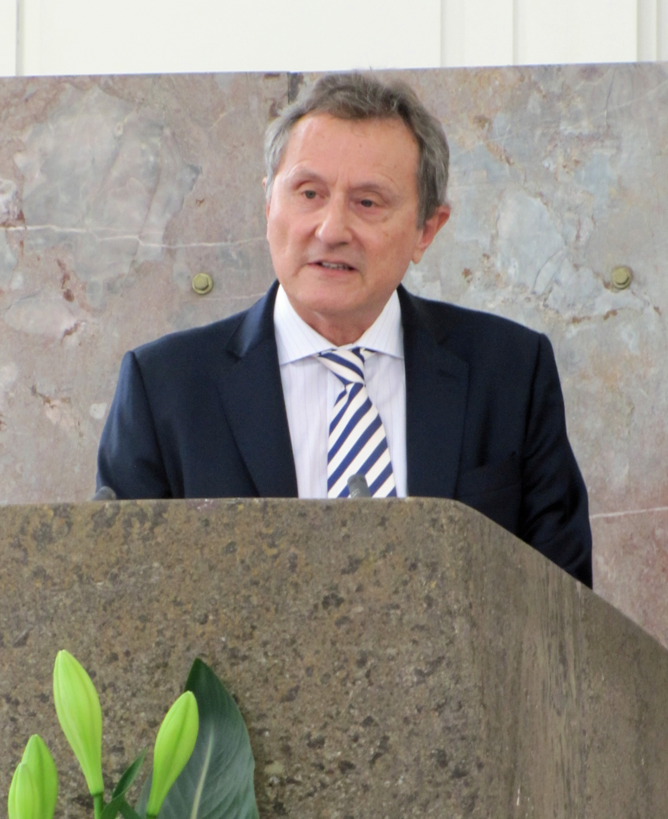 Michael A. Gotthelf bei seiner Begrüßungsrede zur Verleihung des Ludwig-Börne-Preises an Souad Mekhennet, am 27. Mai 2018 in der Frankfurter Paulskirche.